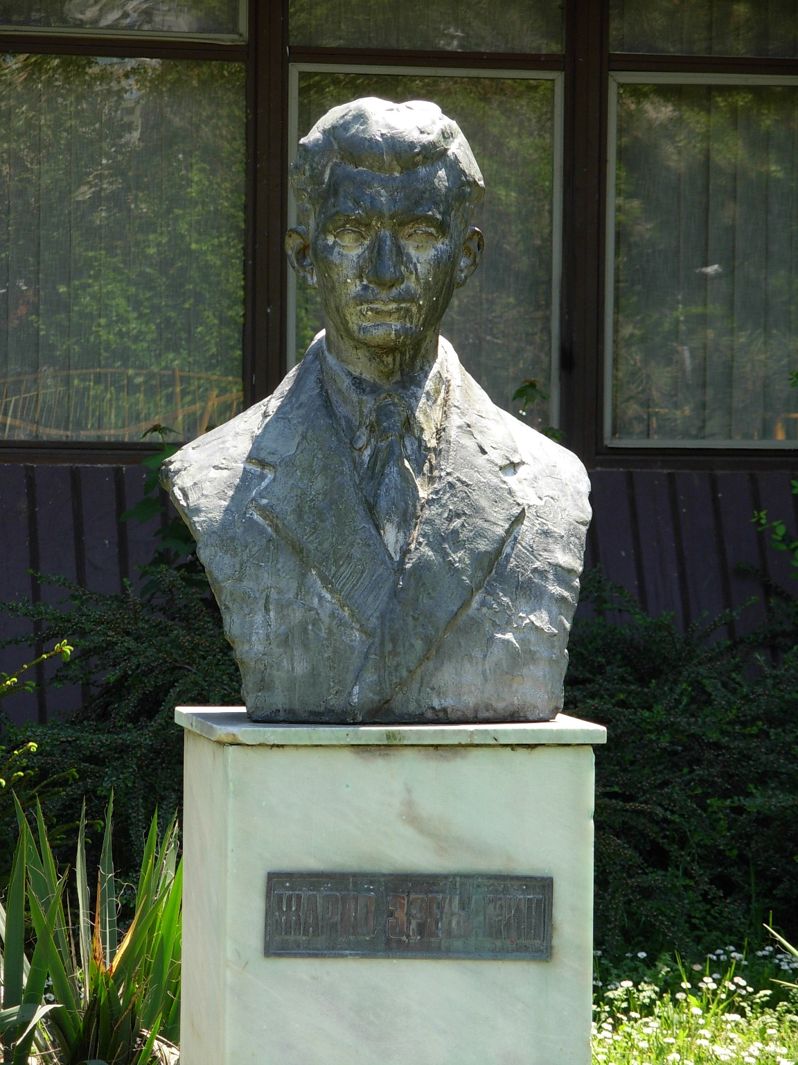 Bista Žarka Zrenjanina ispred osnovne škole "Žarko Zrenjanin" u Novom Sadu.